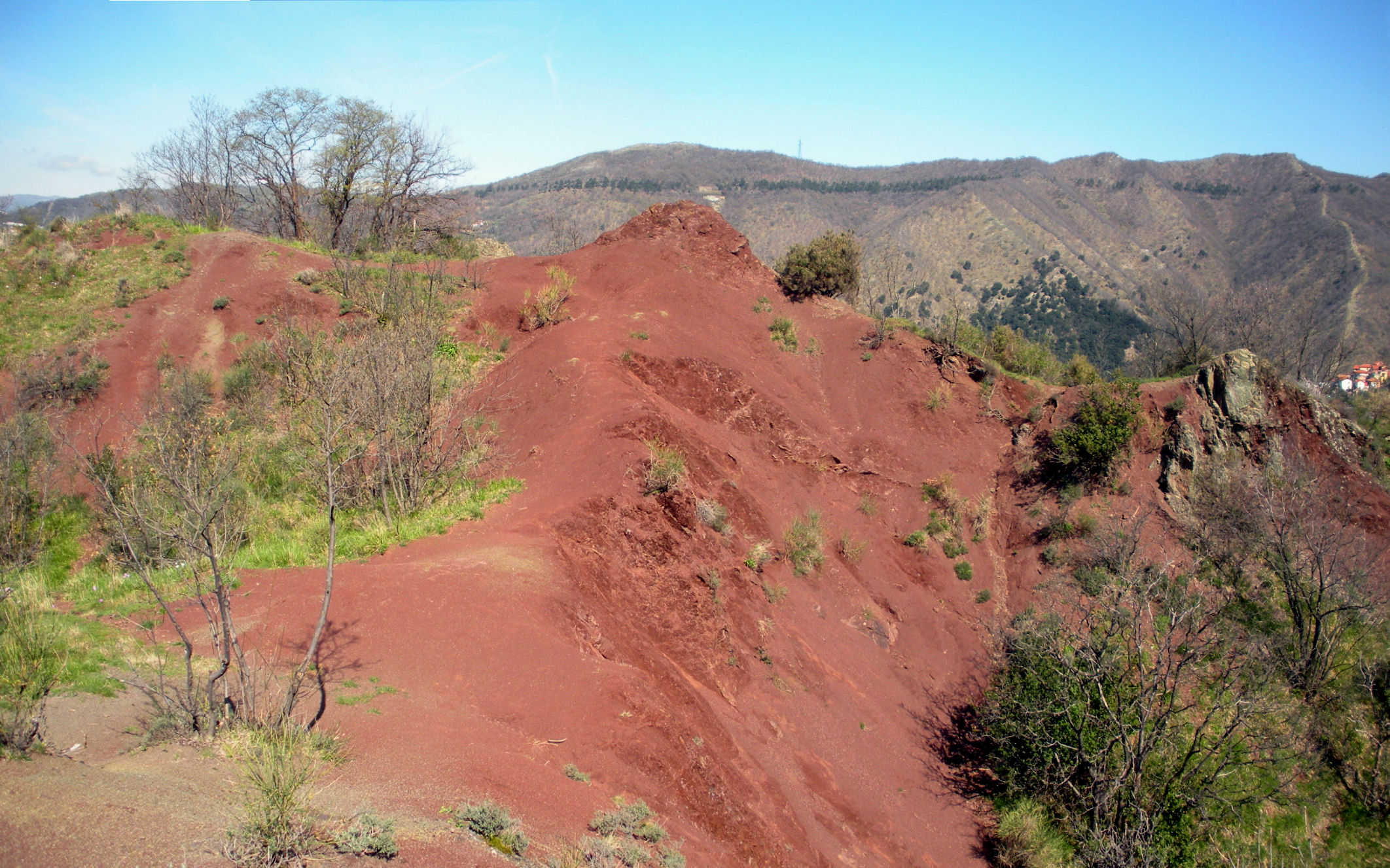 La località Terre Rosse (Molassana, quartiere di Genova)